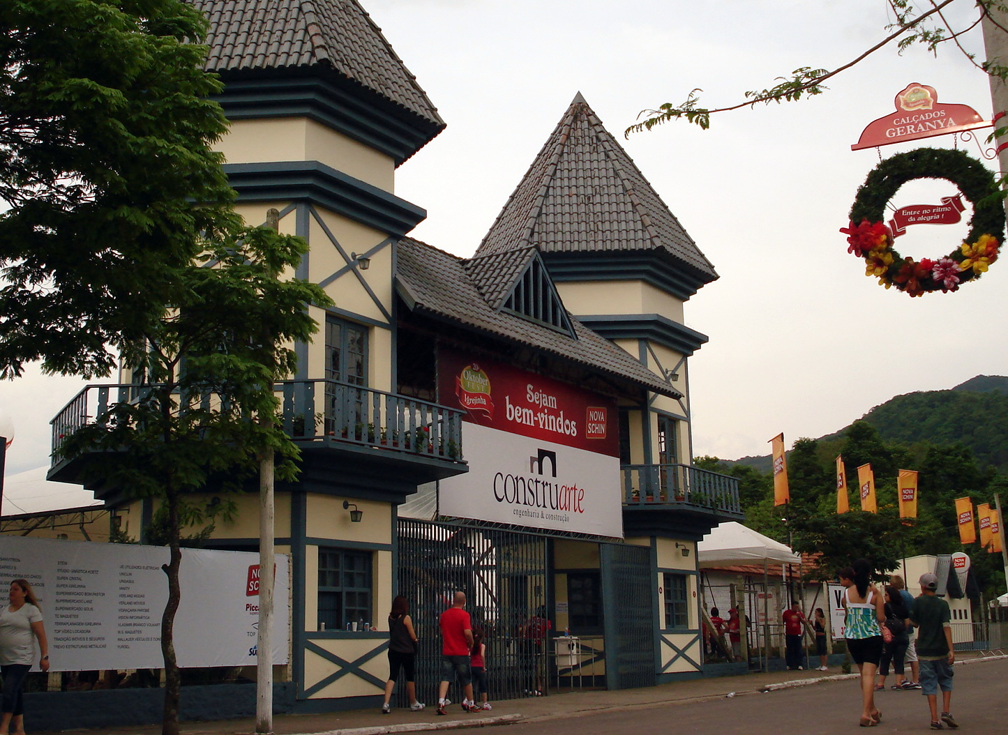 Vista do pórtico de acesso ao Parque da oktoberfest de Igrejinha.